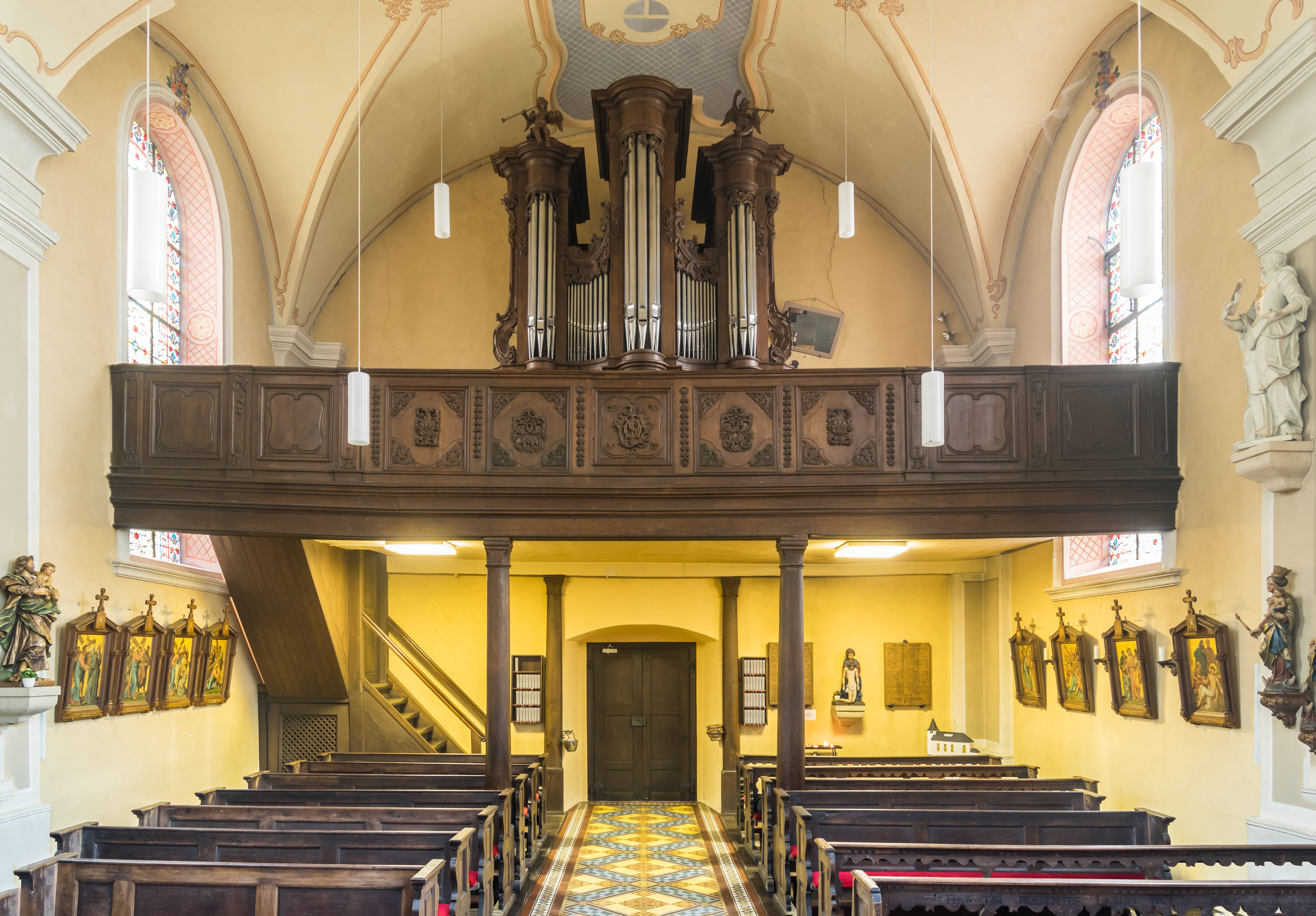 Bilder von der Kirche St Nikolaus in Aremberg Bilder aus dem Innenraum der Kirche